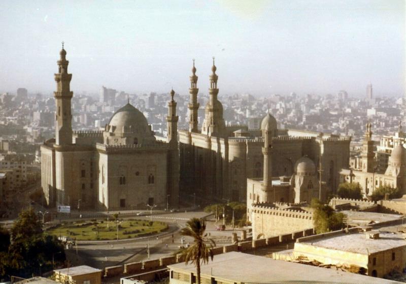 Cairo - Sultan Hasan Mosque Next to Al Rifai Mosque